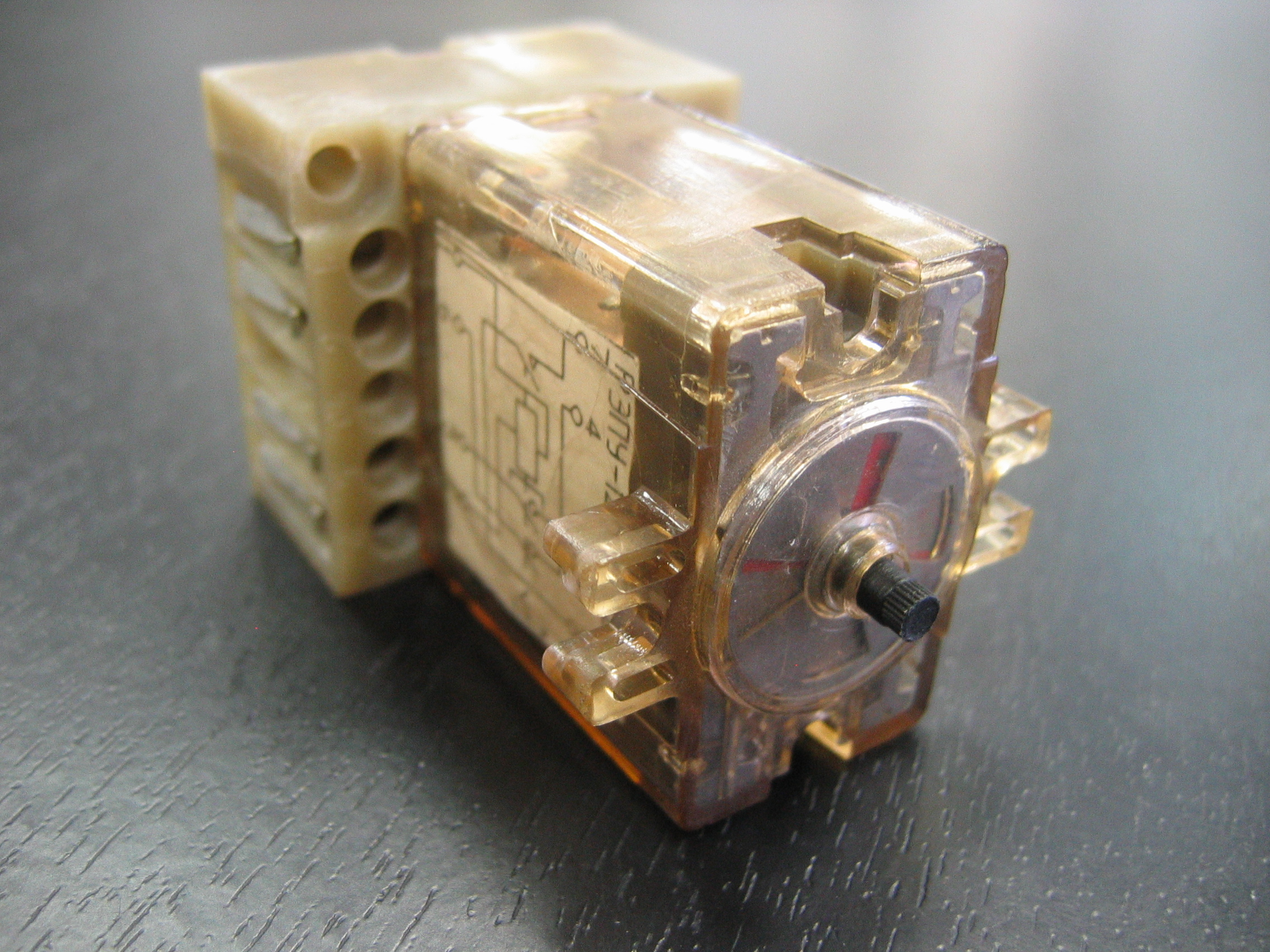 Указательное реле